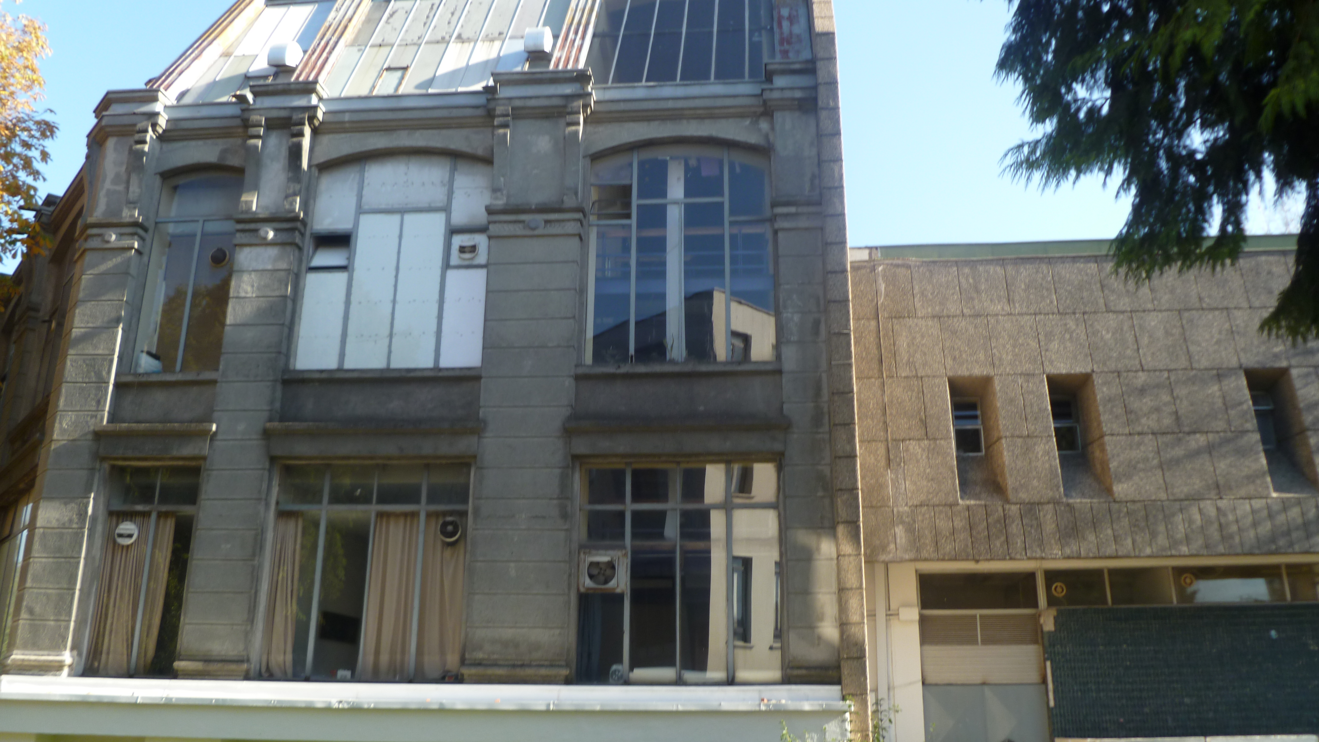 casa del arte, udec